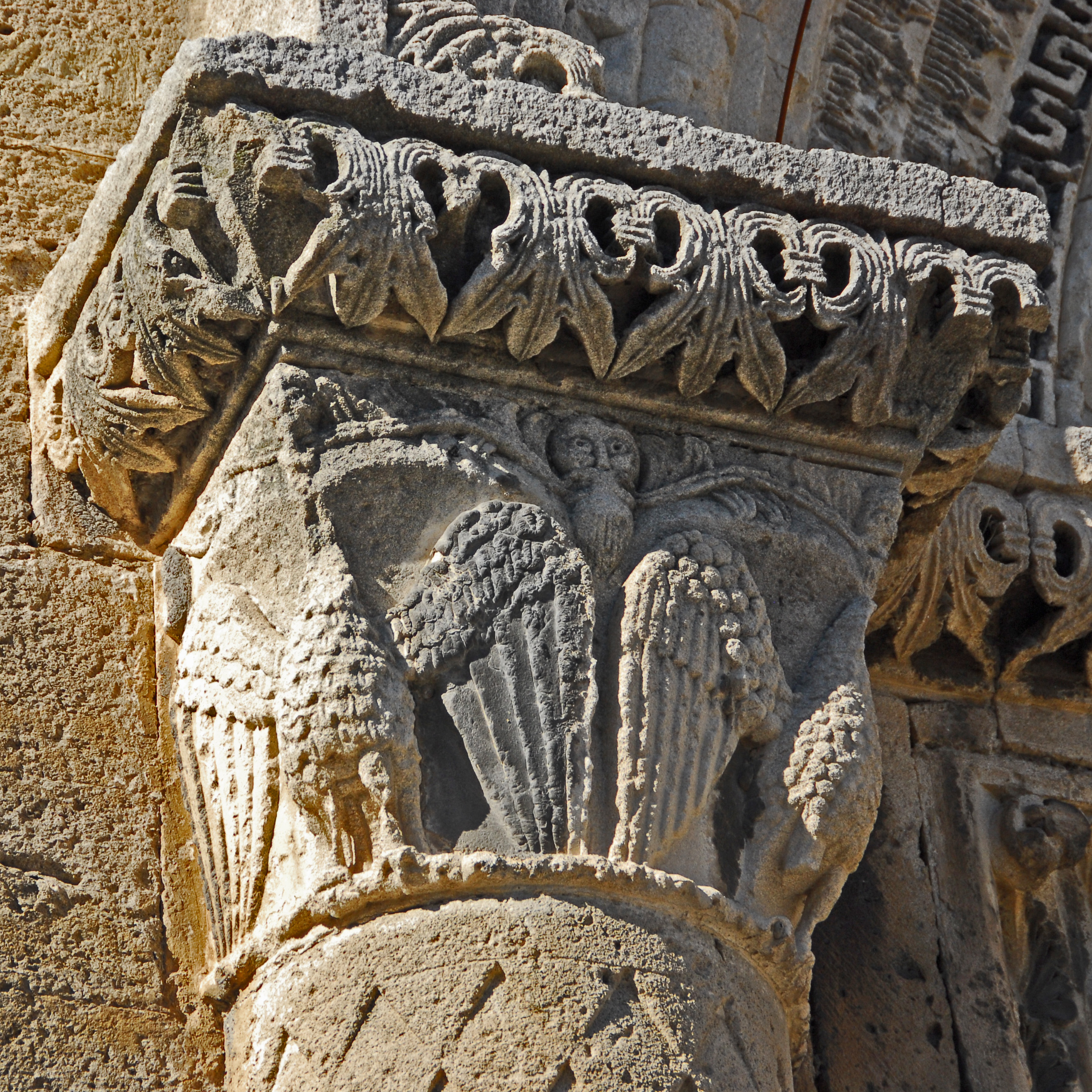 N-D-du-Lac du Le Thor, Adlerkapitell an Vorhalle